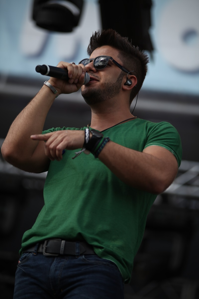 Cristiano Melo Araújo (Goiânia, 24 de janeiro de 1986) é um cantor, instrumentista e compositor brasileiro de música sertaneja. Na foto, canta na FIFA Fan Fest em Taguatinga, DF.